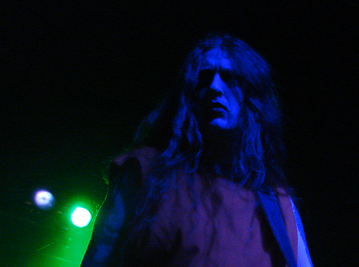 Marduk en concert à l'Elysée-Monmartre, Paris, le 2/12/2007. Morgan à la guitare.